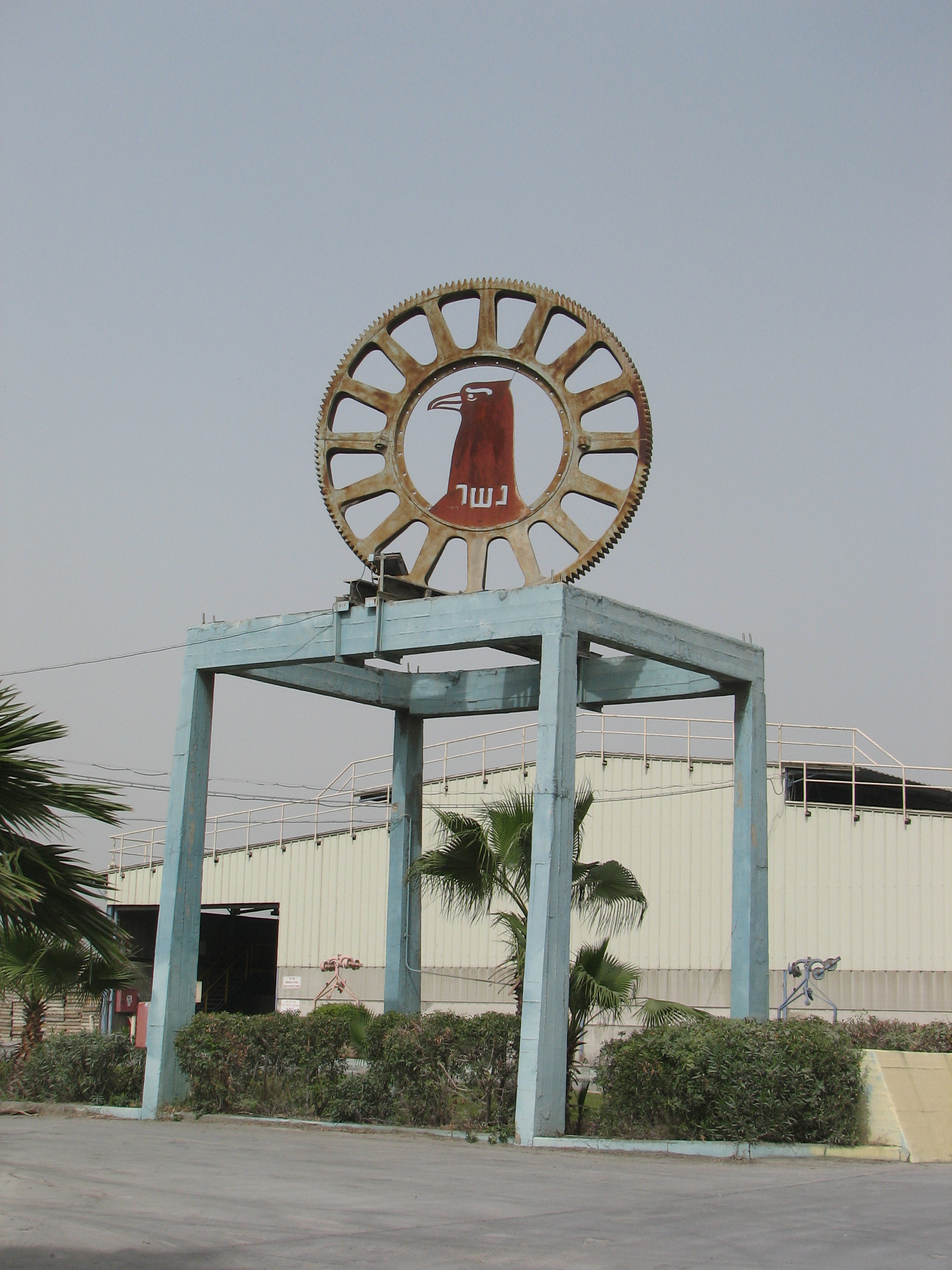 Nesher Israel Cement Enterprises in the city Nesher Israel. The factory was astablished in 1925 בית החרושת למלט בנשר- היום שמו נשר מפעלי מלט ישראליים נרשם ב- 1922 . בשנים לאחר מיכן הוקם באזור נשר . הכבשן הראשון הופעל באוקטובר 1925 מתקן ששימש כמסוף לקרונית מיכלית שהעבירה מזוט מבתי הזיקוק למילוי במיכלי המזוט. המזוט שימש כחומר בעירה להדלקת הכבשנים